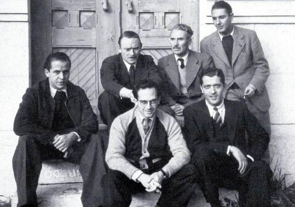 Artistas que trabalharam para o Secretariado de Propaganda Nacional na gestão de António Ferro. Thomaz de Mello ou Tomás de Melo (Tom), Fred Kradolfer, Emmérico Nunes, Bernardo Marques, Carlos Botelho e José Rocha. Faltam Estrela Faria, Maria Keil, Cunha Barros, Paulo Ferreira e Eduardo Anahory. Fotografia de 1939. Lisboa, Portugal